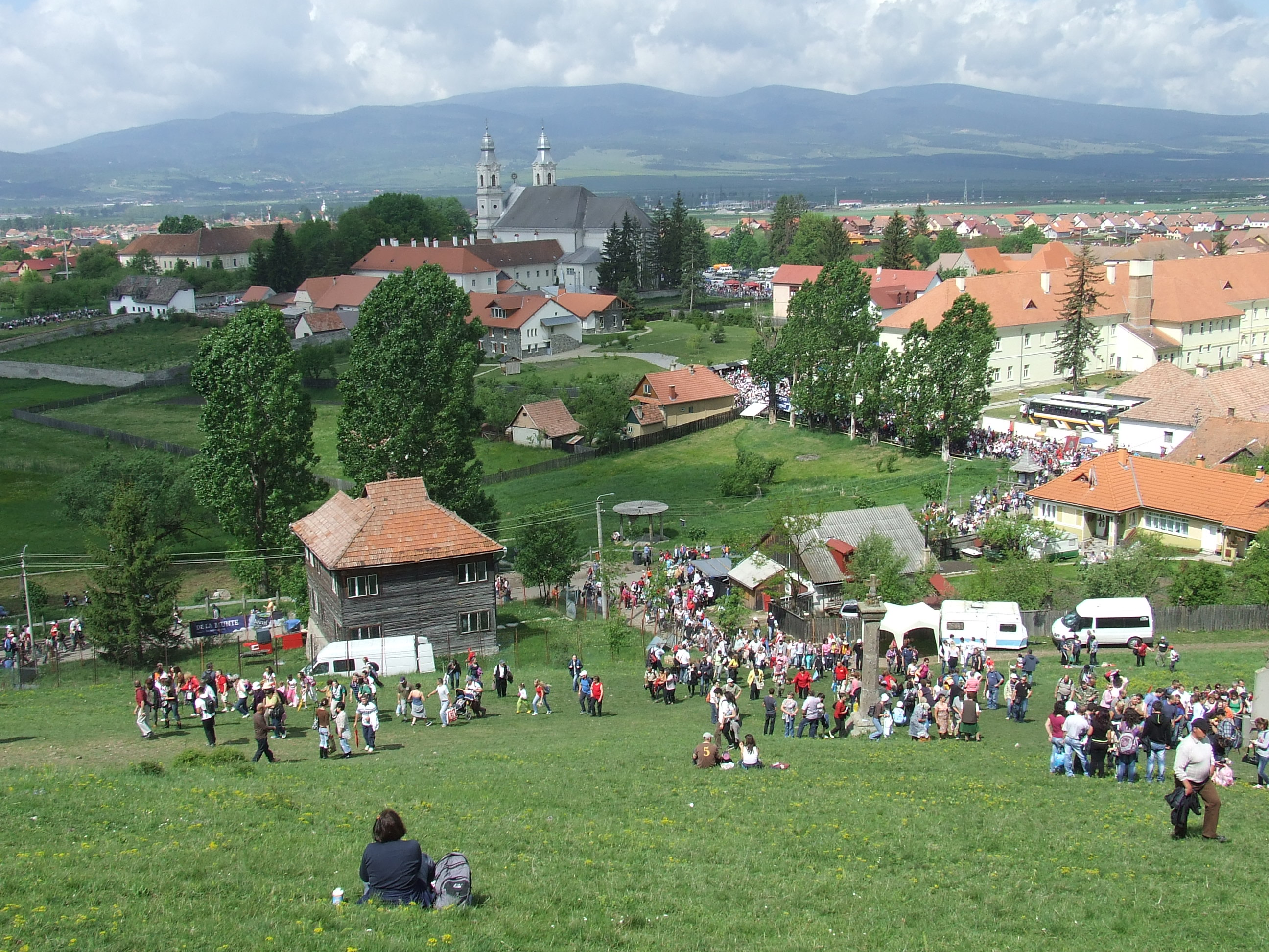 Csíksomlyói búcsú